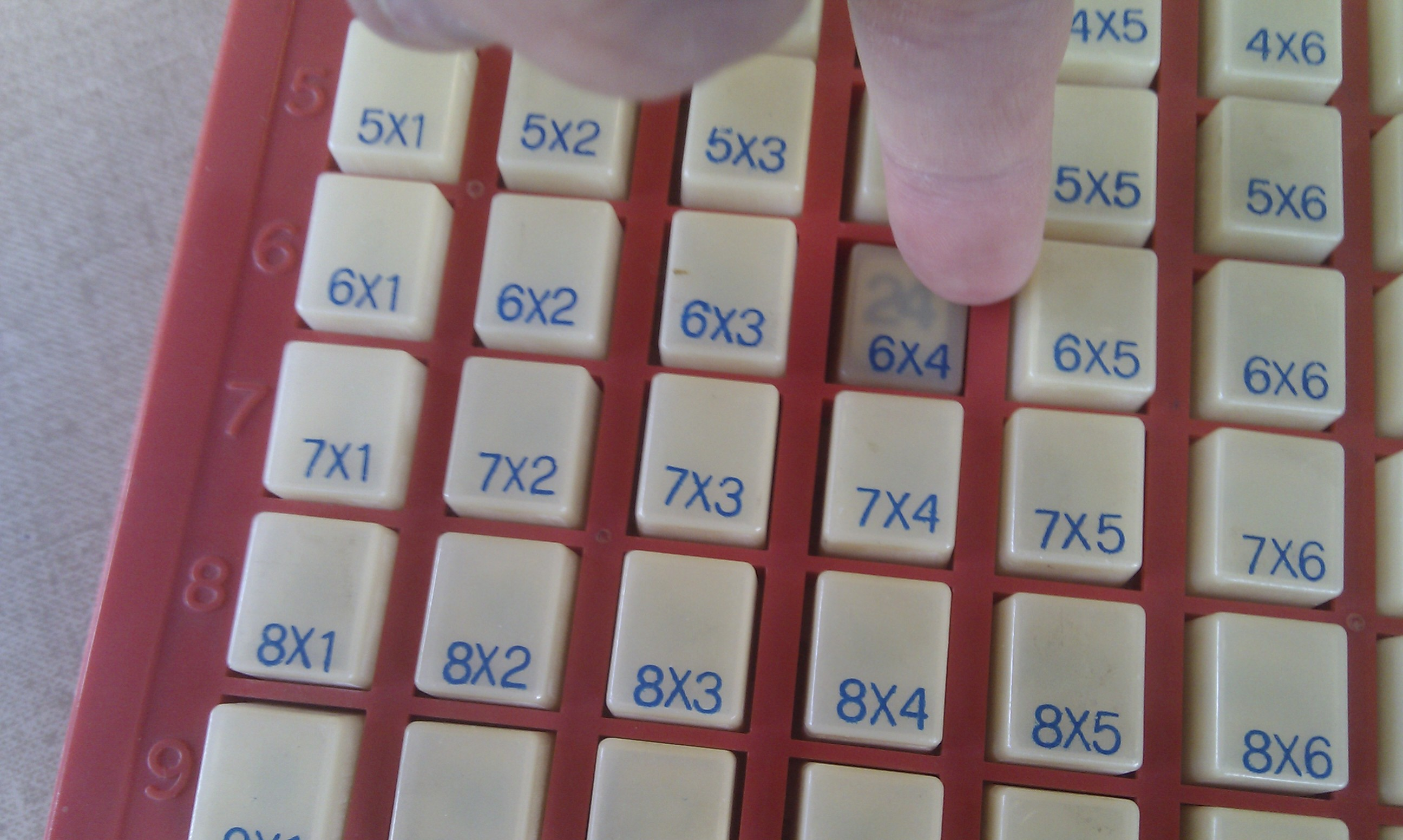 Didactisch materiaal voor het automatiseren van de tafels van vermenigvuldiging.